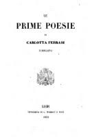 Carlotta Ferrari Le Prime Poesie 1853 cover